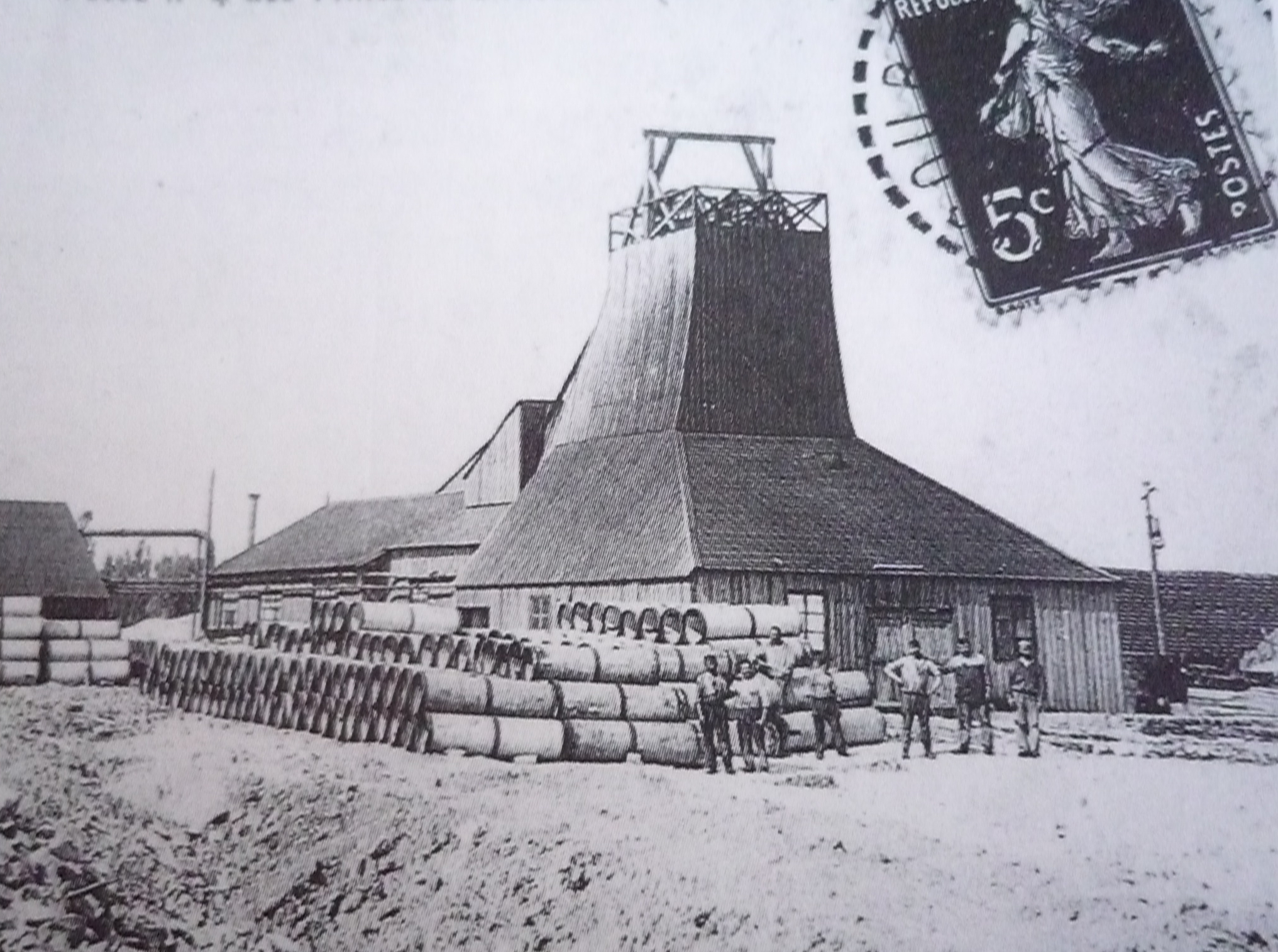 La Fosse n° 4 - 5 dite Maroc de la Compagnie des mines de Drocourt était un charbonnage constitué de deux puits situé à Méricourt, Pas-de-Calais, Nord-Pas-de-Calais, France.